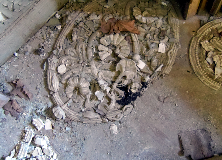 Restos de las escayolas del hotel Zabalgoitia